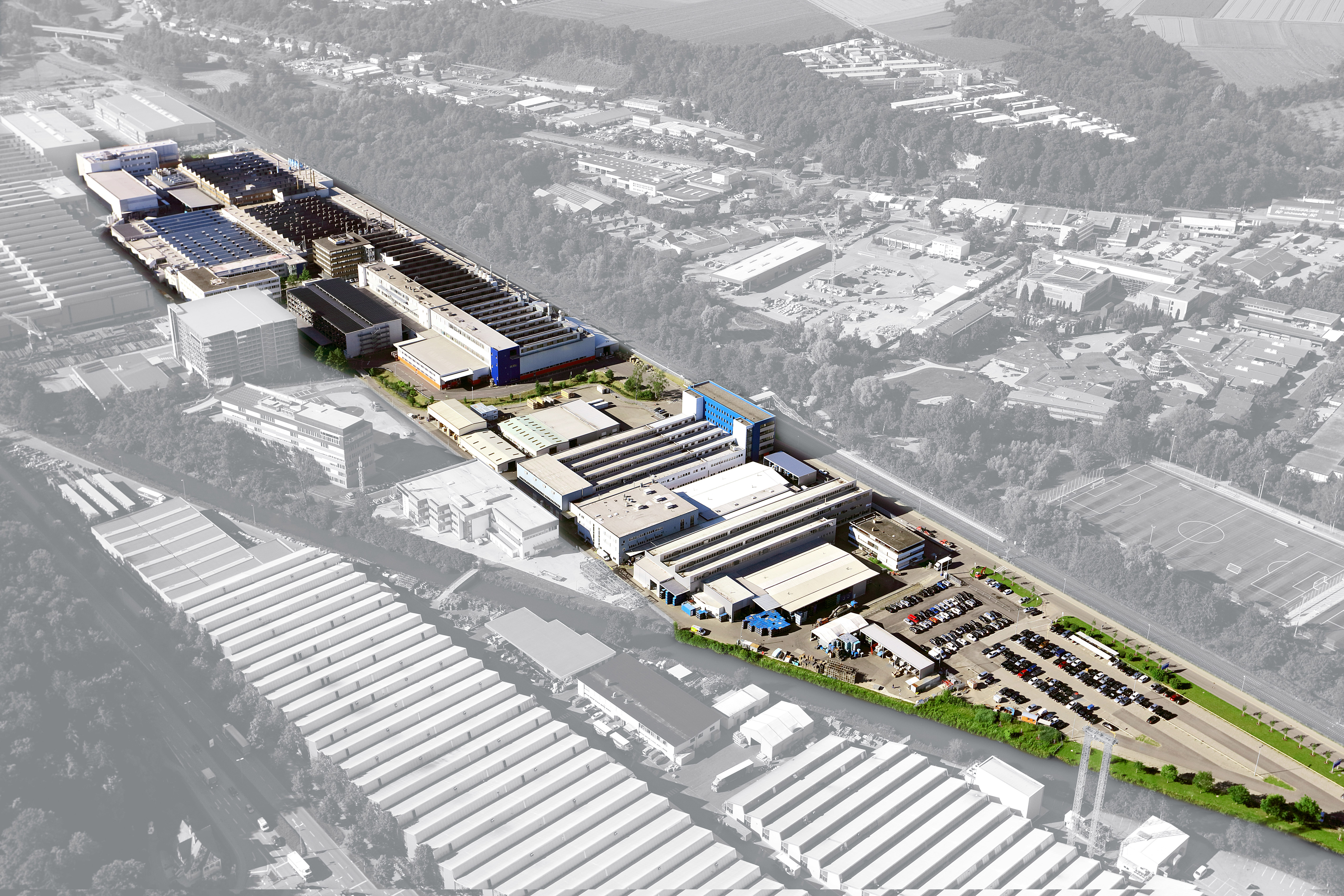 Luftaufnahme der Arthur-Handtmann-Straße